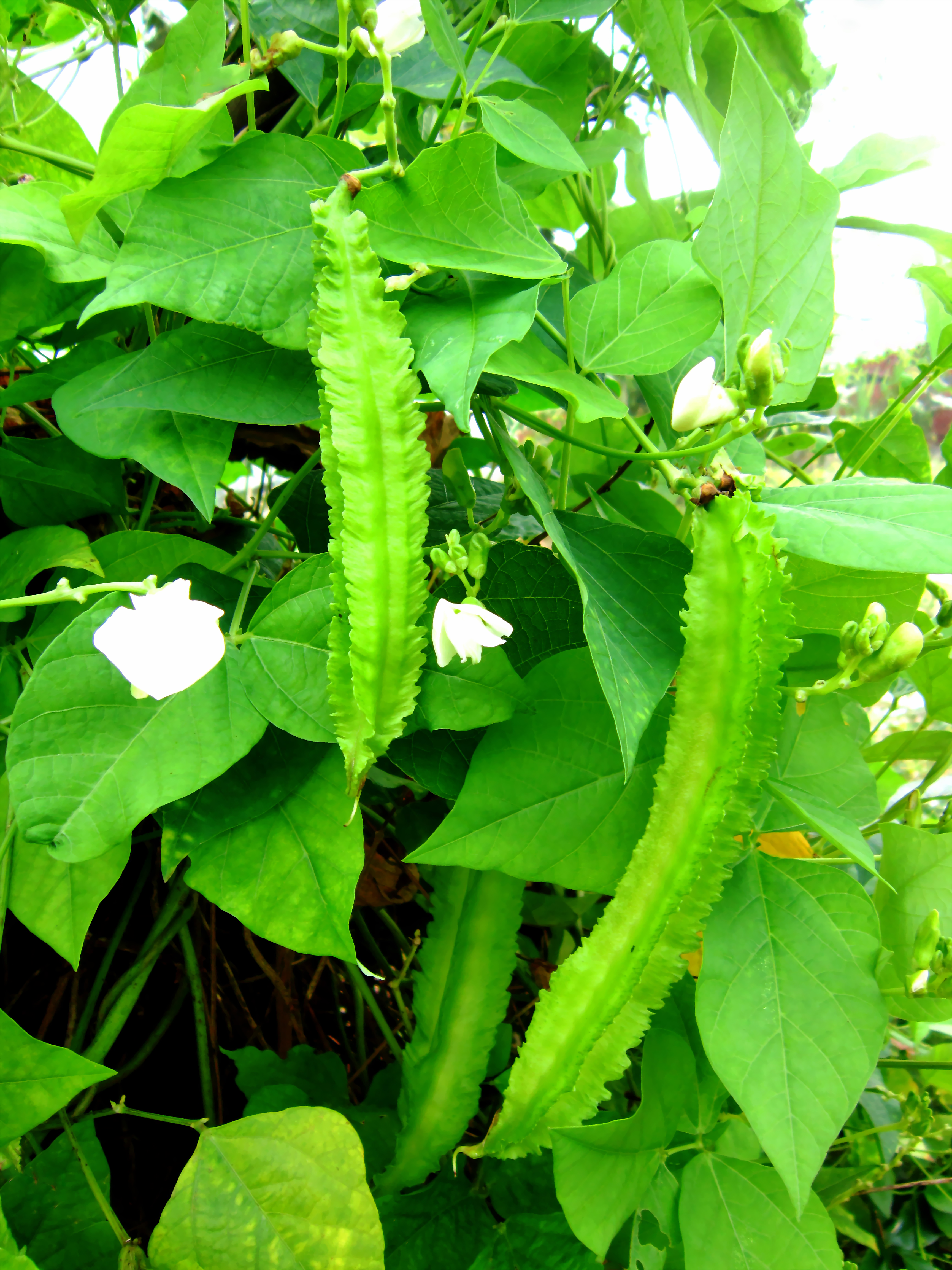 Đậu rồng